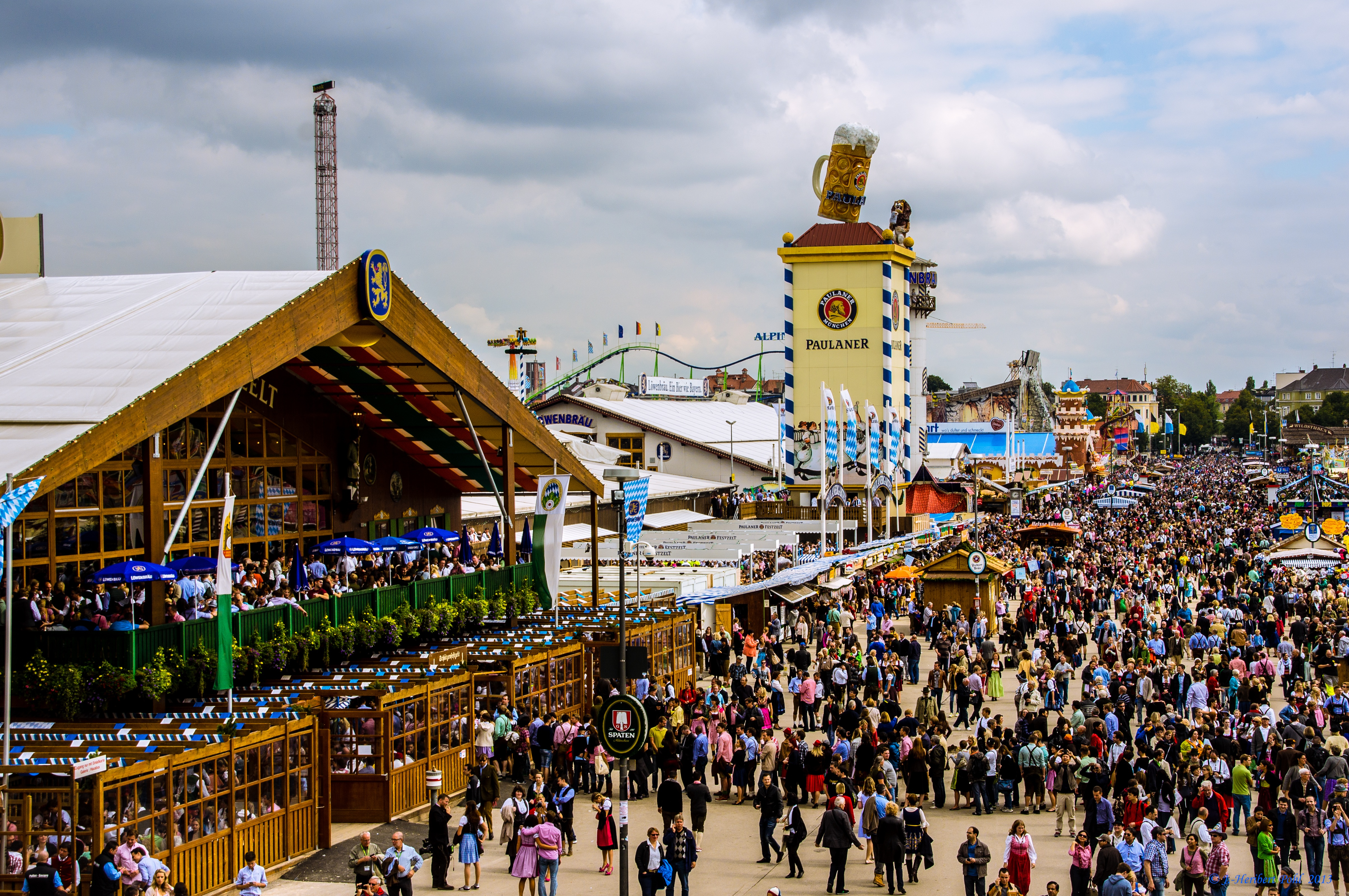 München, Oktoberfest 2013, Der ganz normale Wahnsinn!